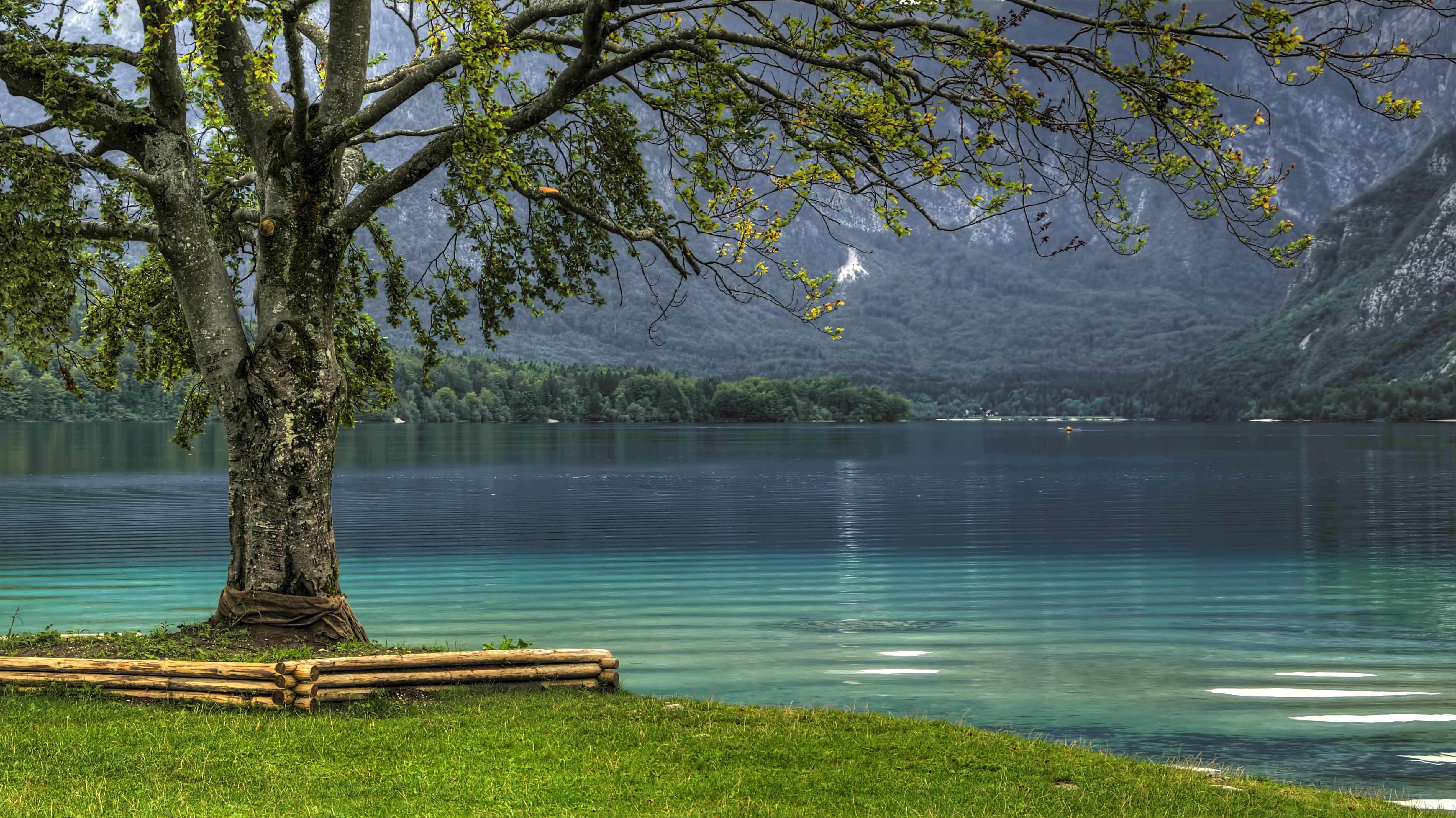 Lago Bohinj